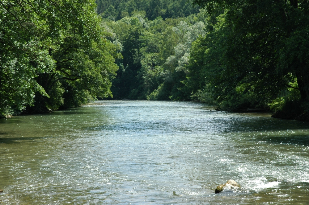 Der Fluss Amper südlich von Fürstenfeldbruck Fotograf: Bernd Reuschenberg